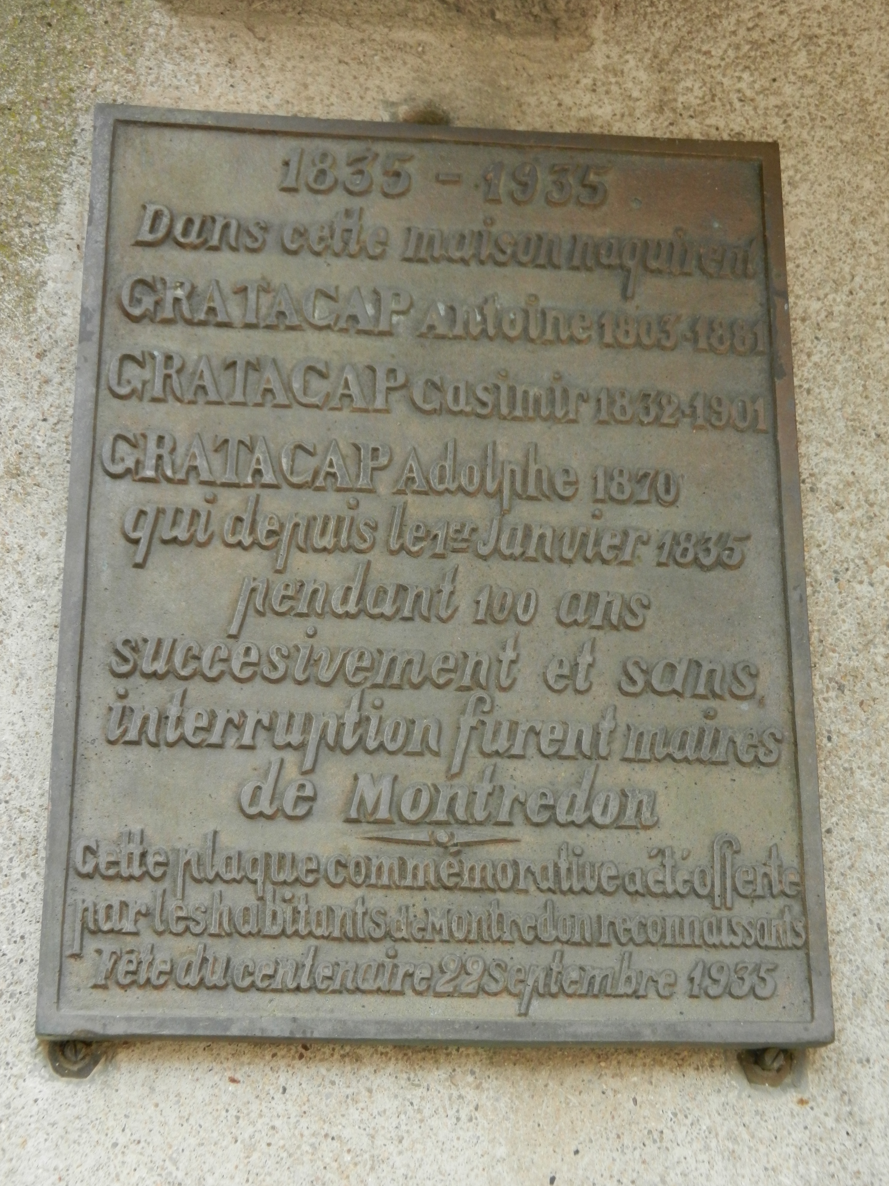 plaque commémorant les 100 ans à la mairie de Montredon (46) de la famille GRATACAP (1835-1935). Elle est toujours visible sur le mur de la maison familiale